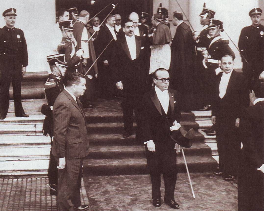 José María Guido abandona la Catedral de Buenos Aires.